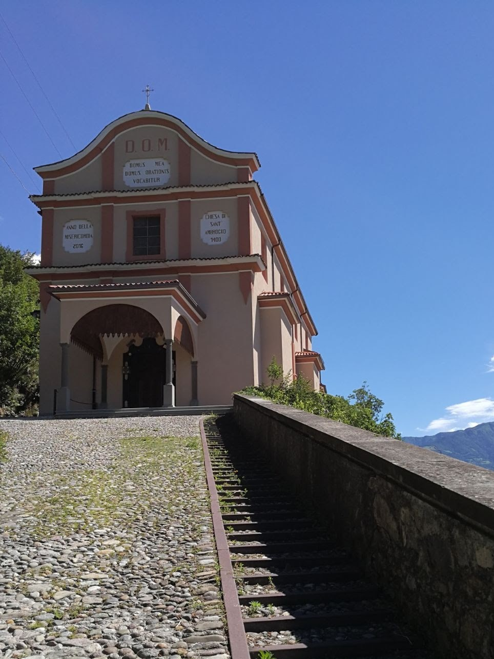 Parrocchiale